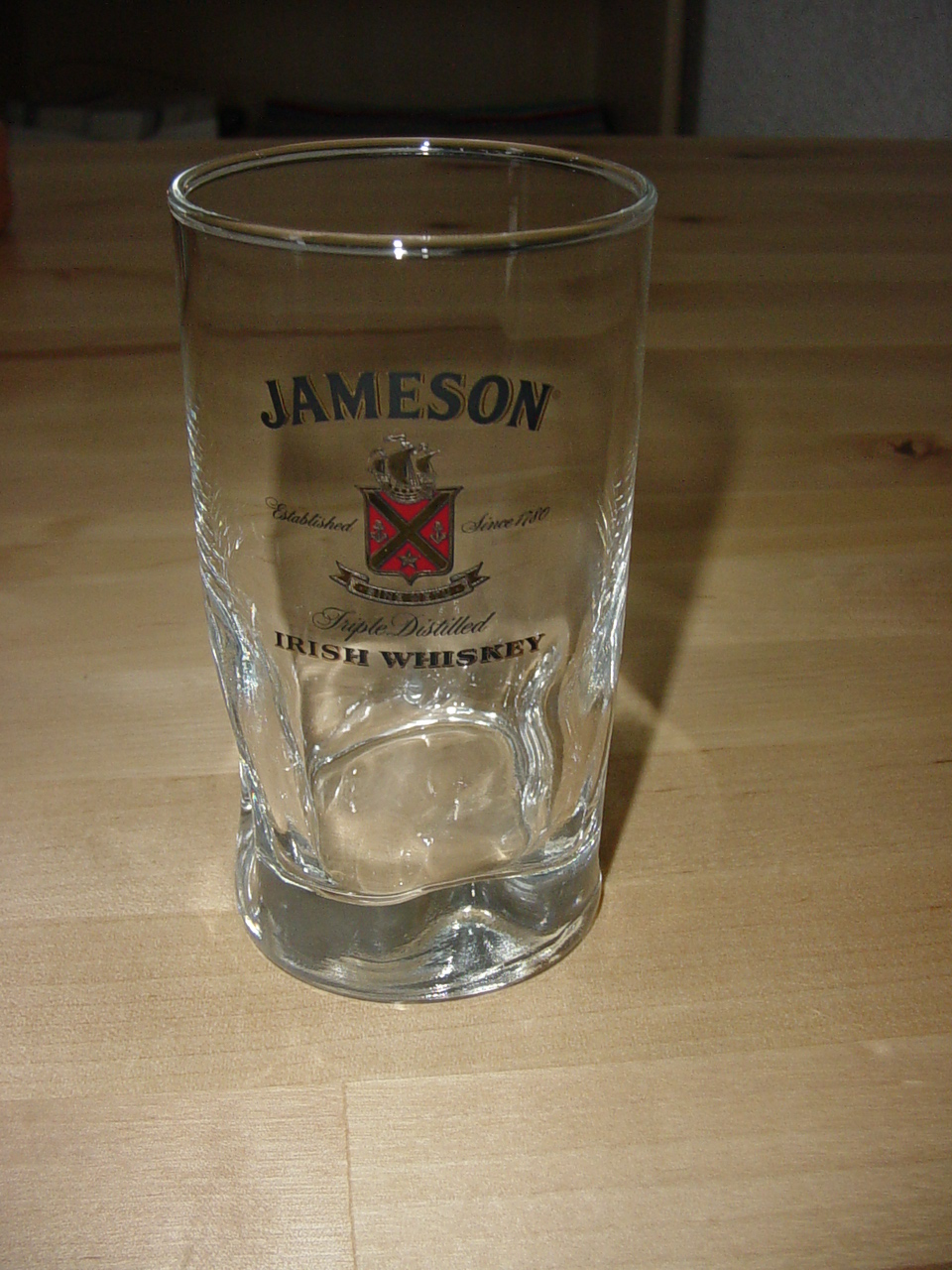 Ein Glas Jameson